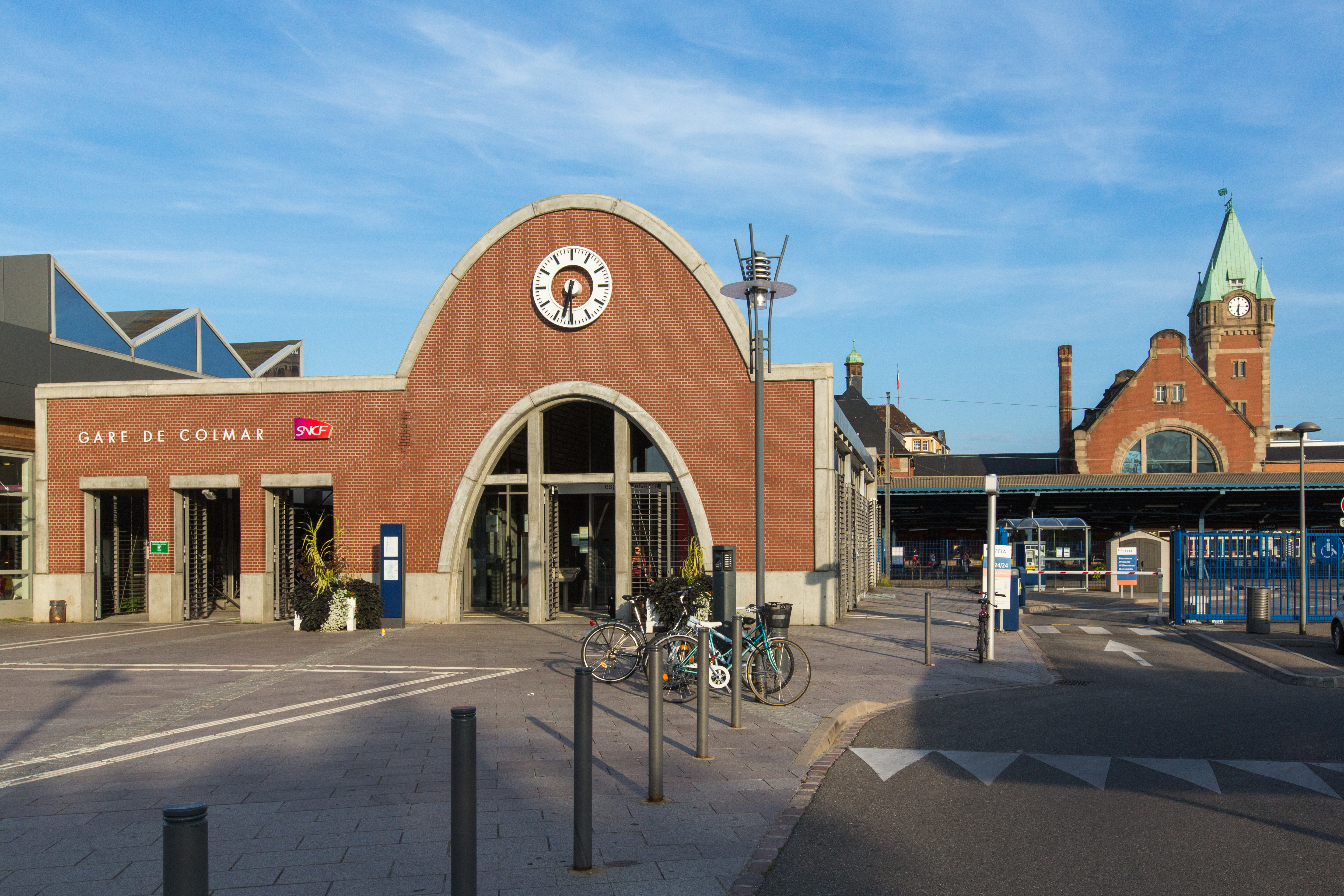 Gare SNCF de Colmar, l’accès côté ouest aménagé à l’occasion de l’arrivée du TGV Est.